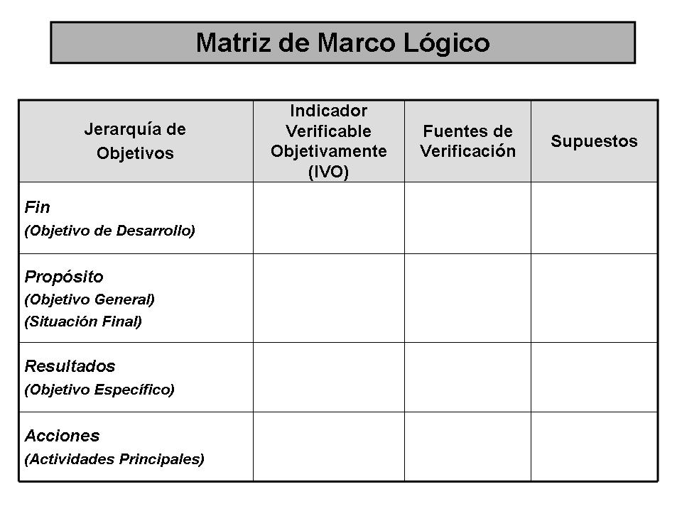 Matriz de Marco lógico, empleando IVO.